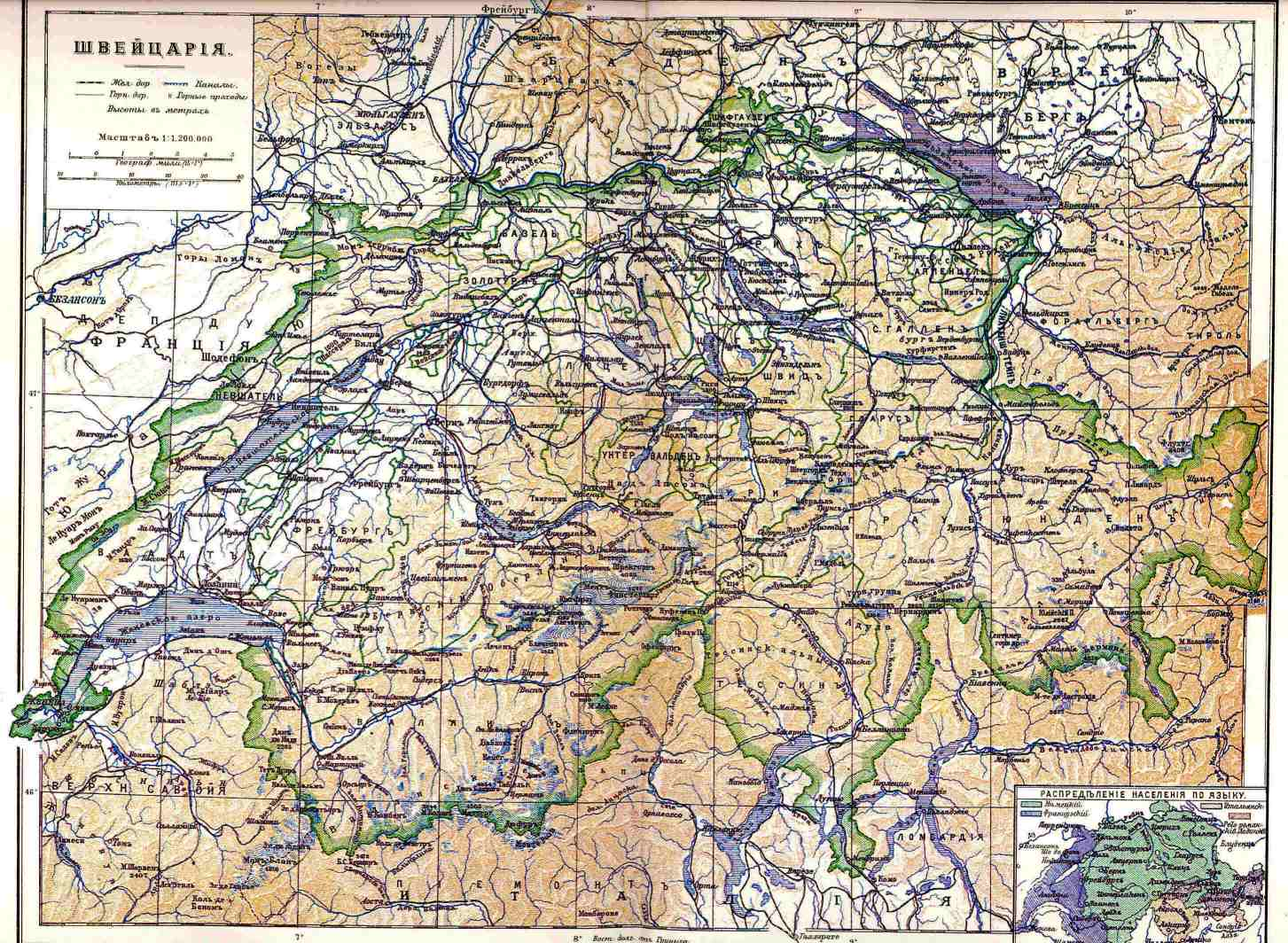 Карта Швейцарии в начале XX века. Иллюстрация из энциклопедии Брокгауза и Ефрона